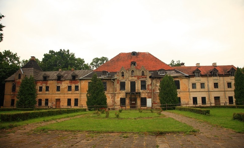 Sztynort – wieś w województwie warmińsko-mazurskim, w powiecie węgorzewskim, w gminie Węgorzewo